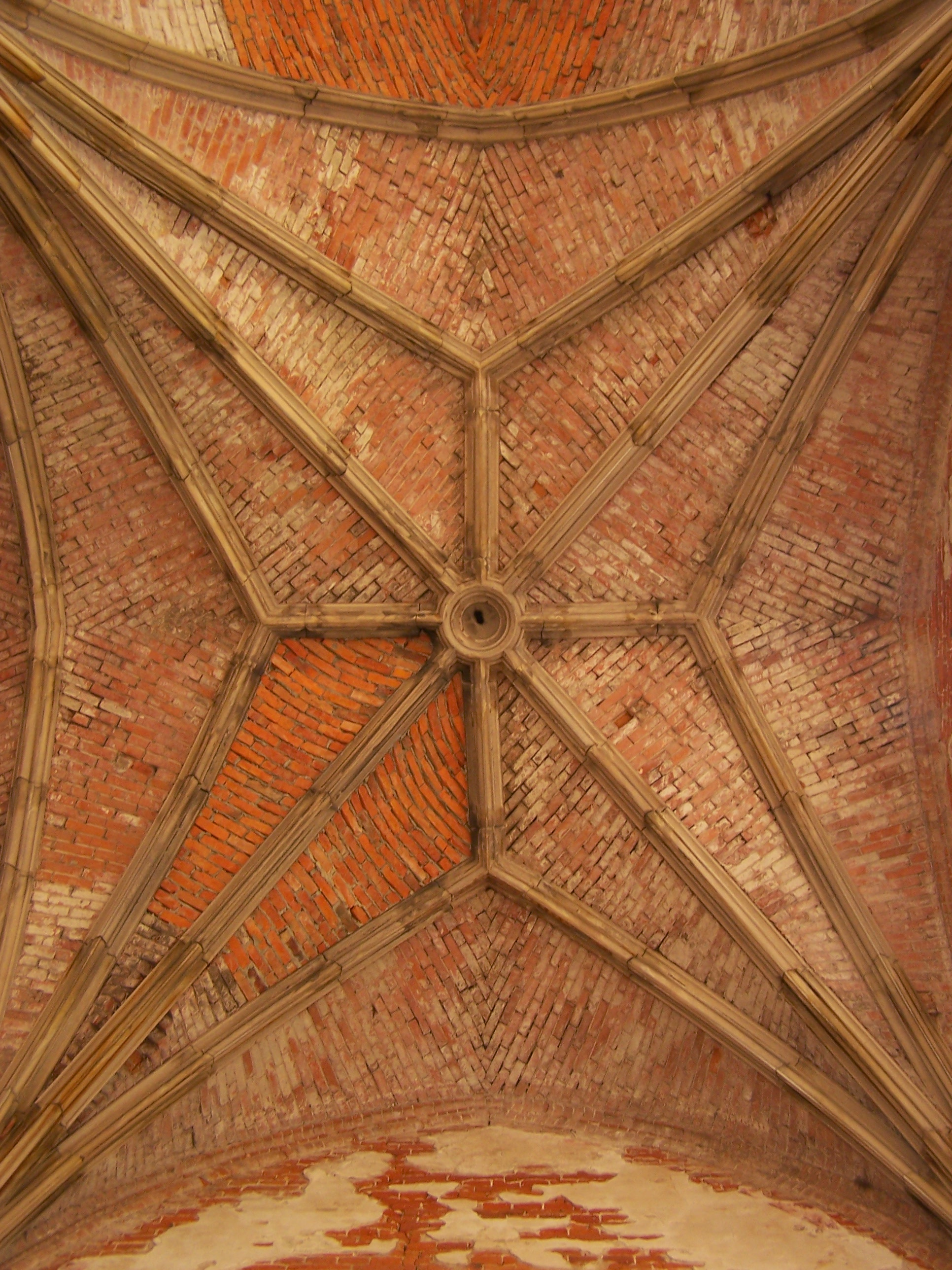 Zamek w Kamieńcu Ząbkowickim.